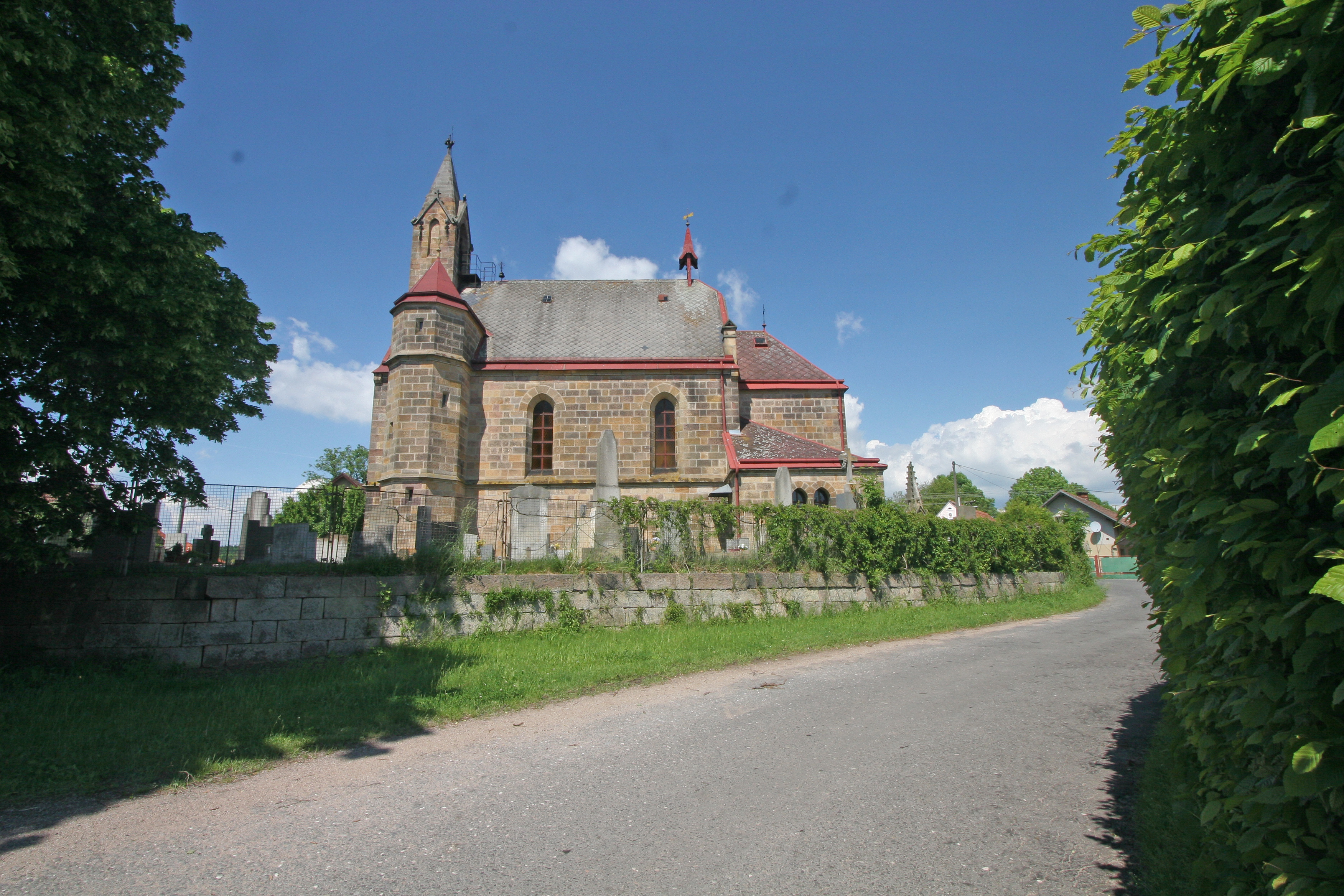 Kostel svatého Jana Křtitele, Svatojanský Újezd